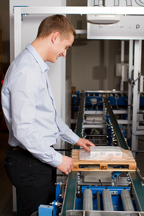 Zajęcia na WSL